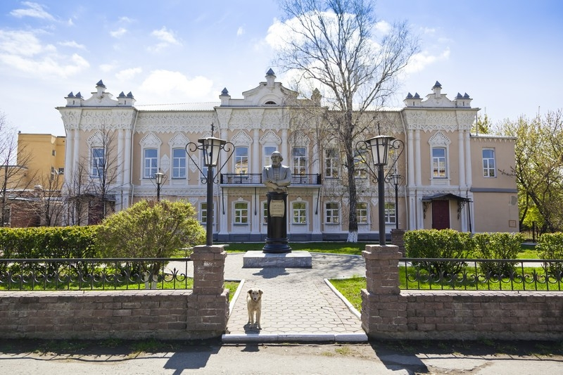 Kurgan.Pro